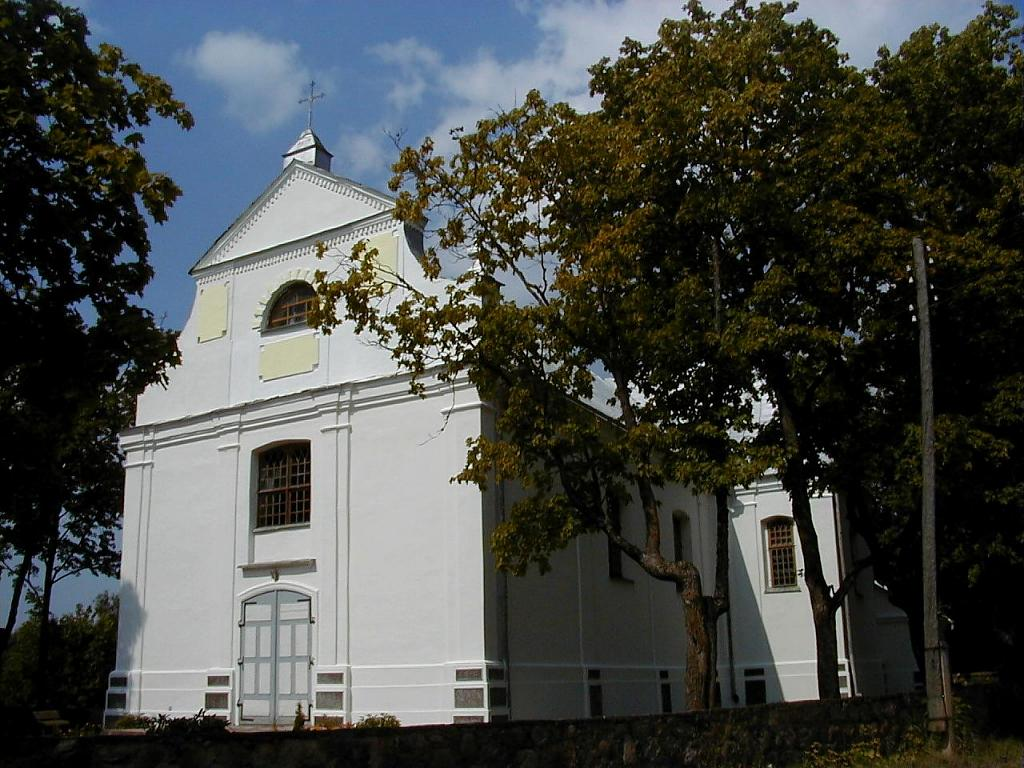 Asūnes baznīca 2002-08-11